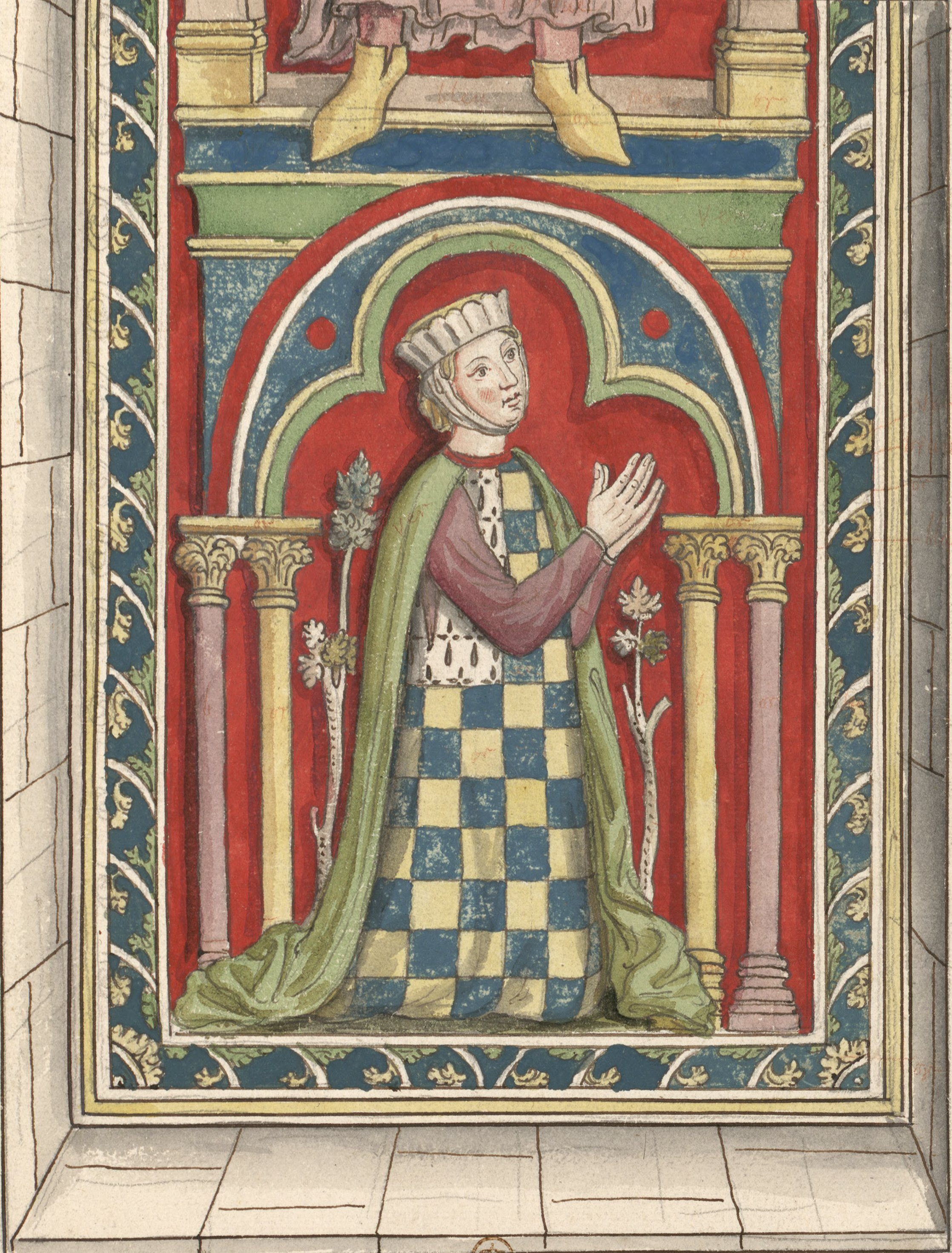 Alix de Thouars